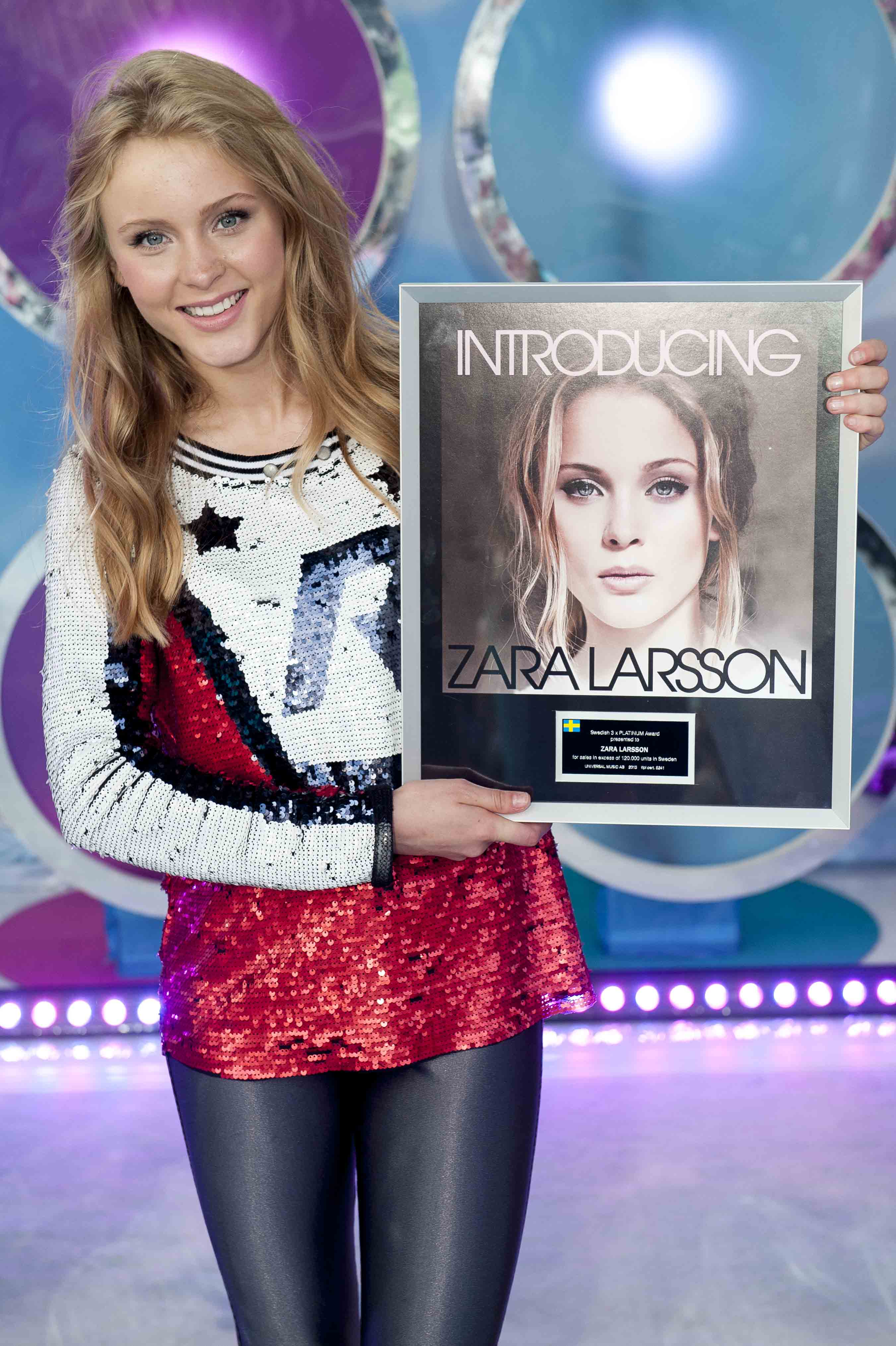 Zara Larsson, Gröna Lund 2013